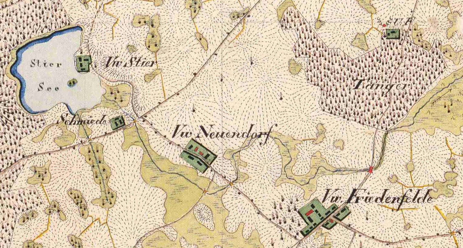 Friedenfelde, Neuendorf, Stier, Neutanger, Gem. Gerswalde, Lkr. Uckermark, Brandenburg, Ausschnitt aus dem Urmesstischblatt 2848 Gerswalde von 1826